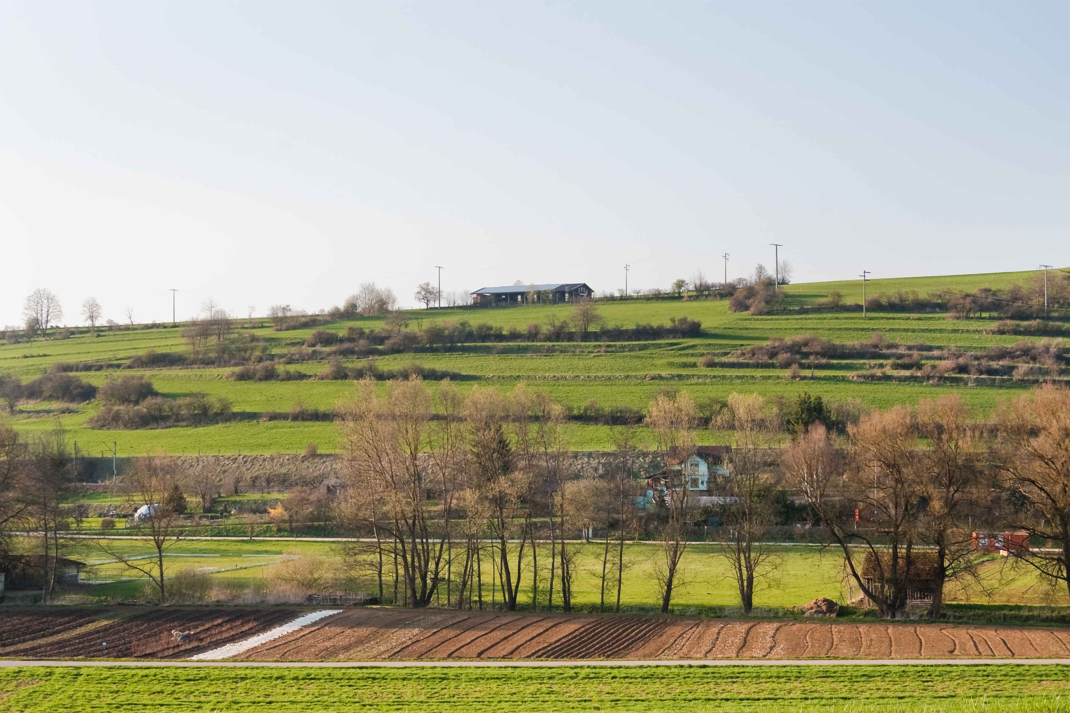 Urspring, Lonsee, Baden-Württemberg, Germany